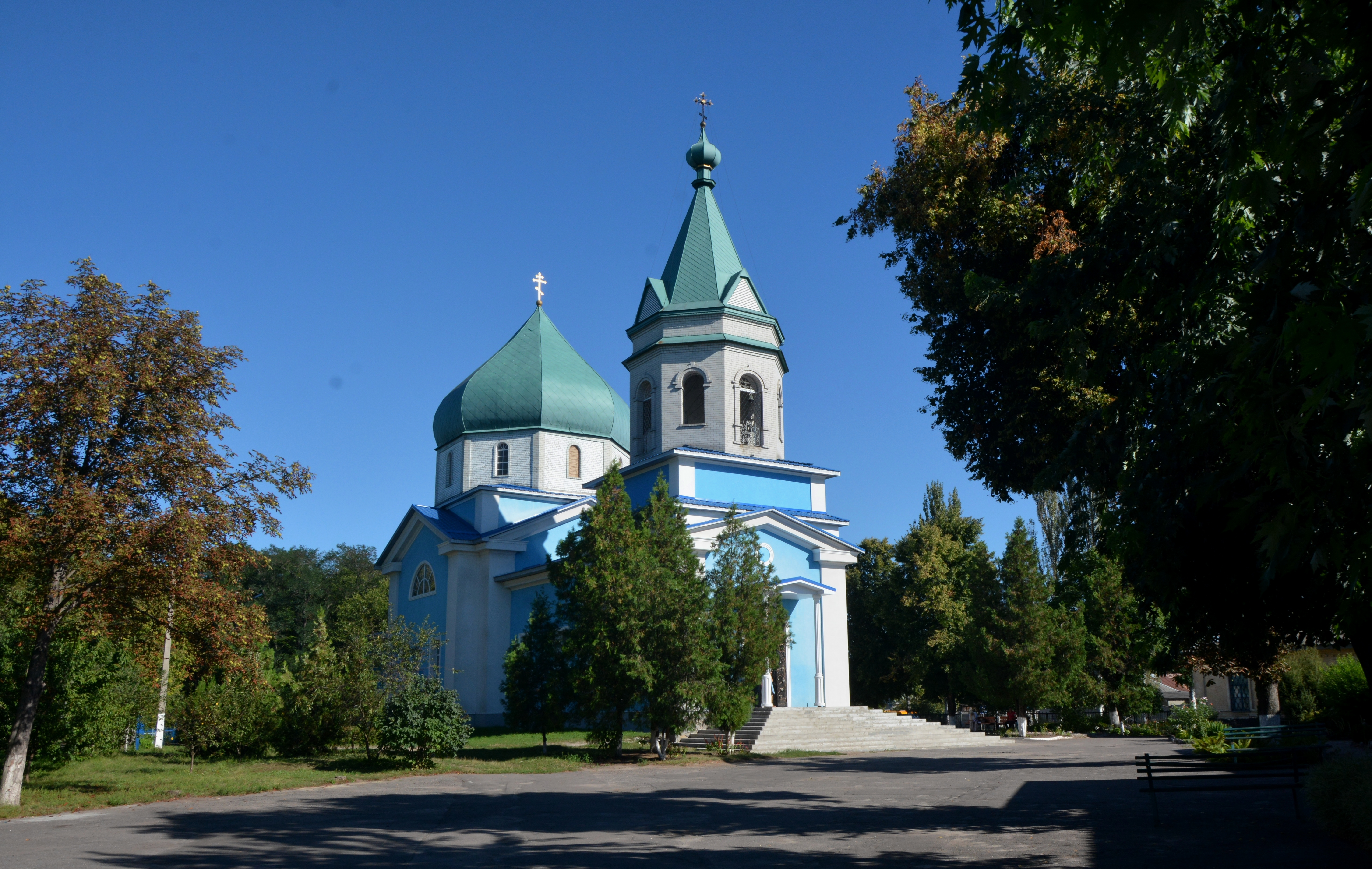 Церква Успіння Божої Матері, Кременчук, Вул. Макаренка, 107